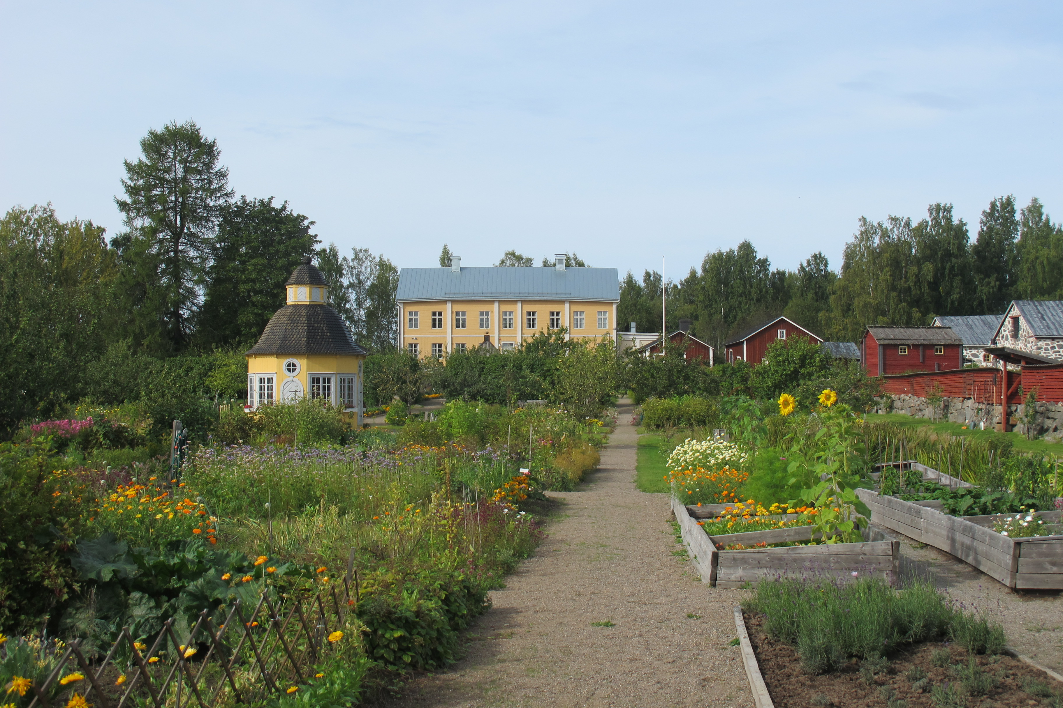 Rosenlundin pappila ja Aspegrenin puutarha; pappila ja kulttuuriympäristö Pietarsaaressa